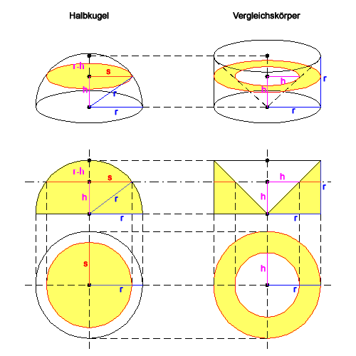 KugelCavalieri